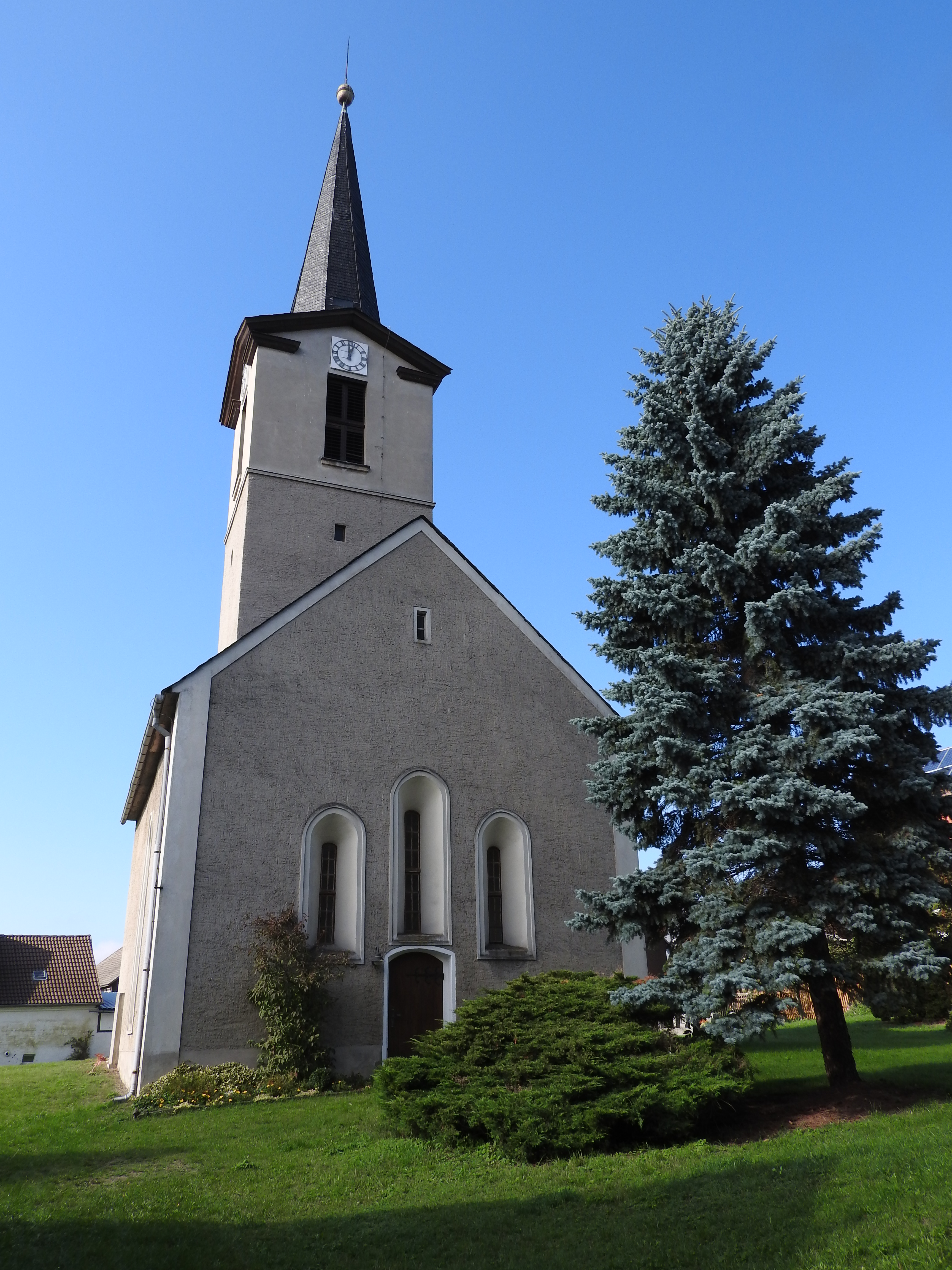 Laurentiuskirche in Oettersdorf, Thüringen